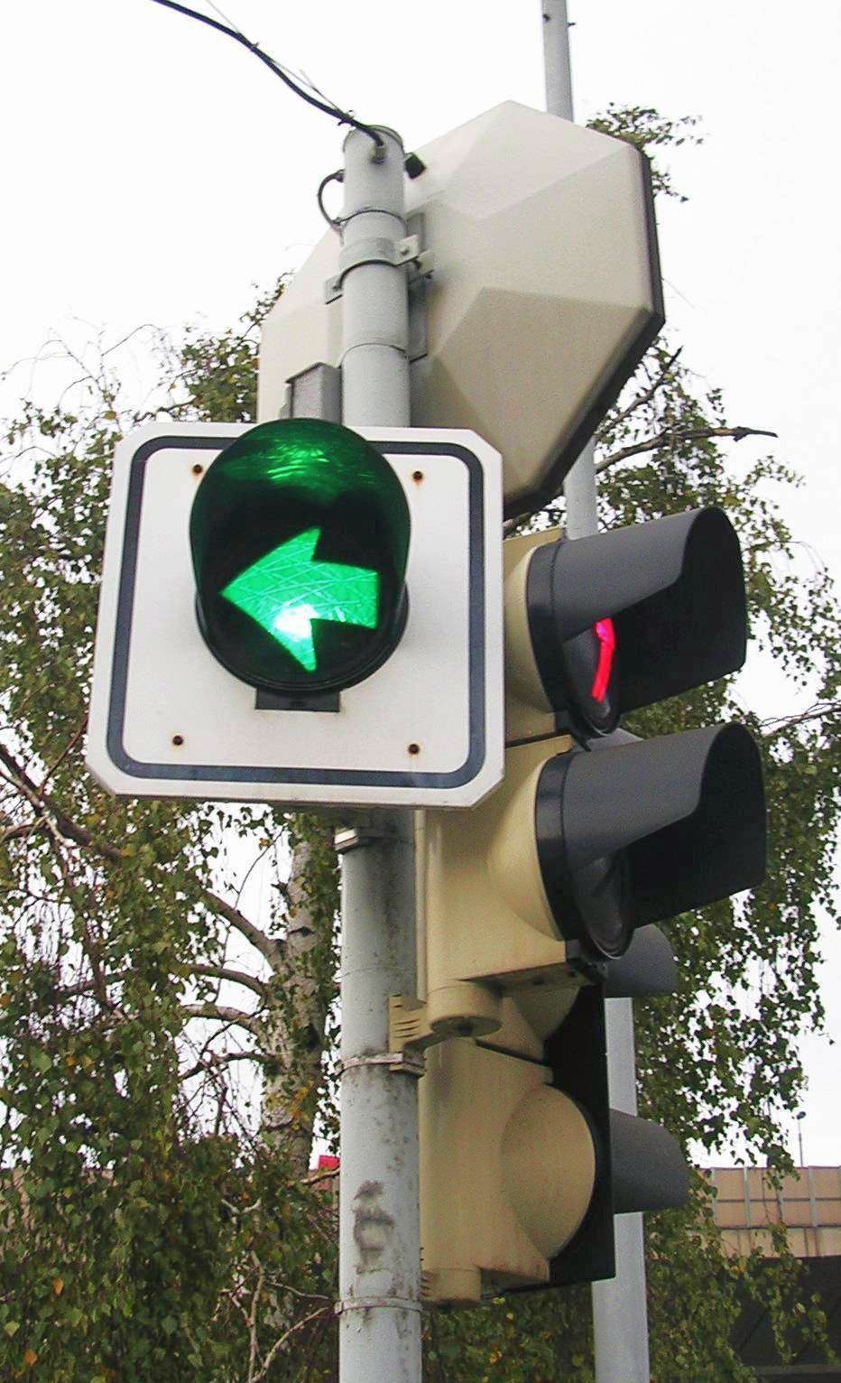 Traffic lights, Prague. Světelné signály, Praha-Zahradní Město (křižovatka Švehlova - Topolová - Ždánická)